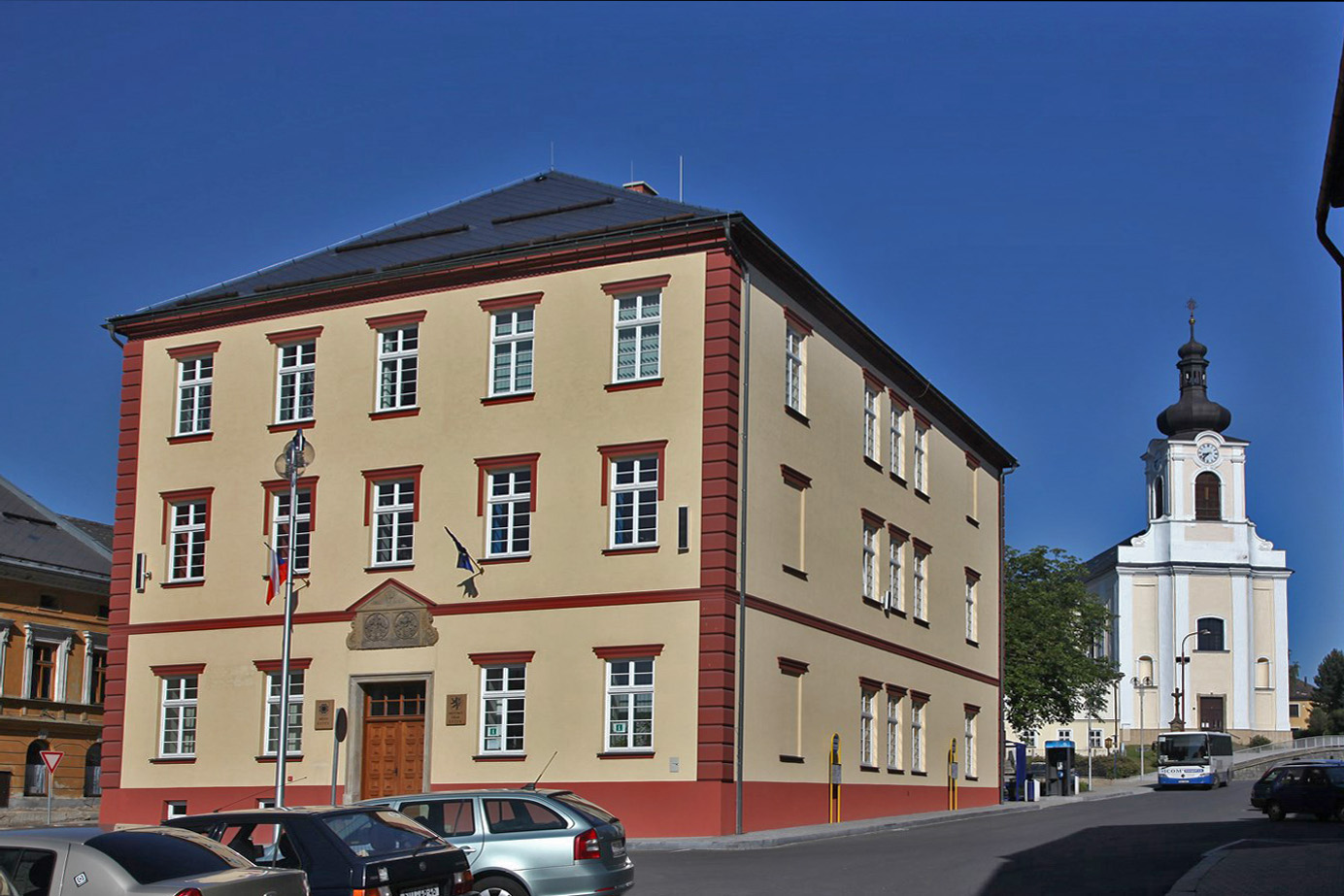 Pohled na štítecké náměstí